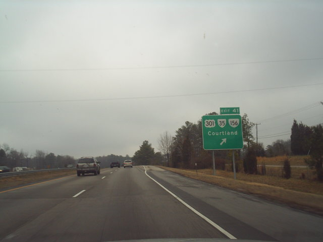 M3367S-4504